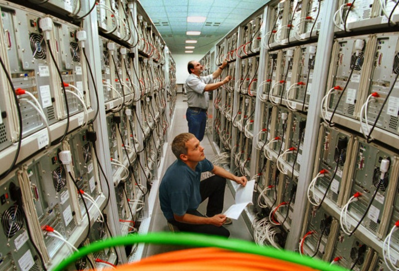 Chemnitzer Linux Cluster (CLIC) an der Technischen Universität Chemnitz